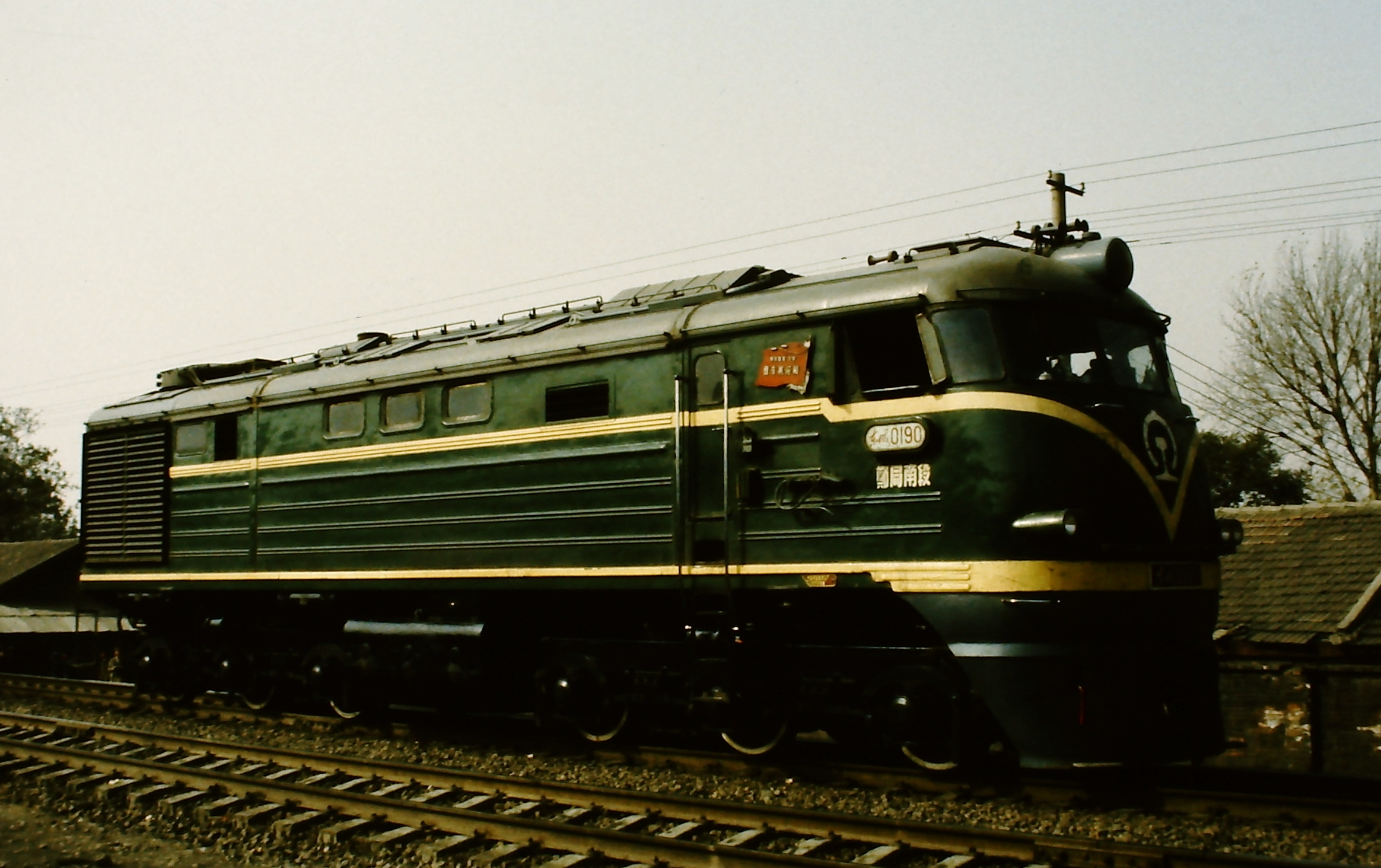 CNR DF3-0190 (Harbin)